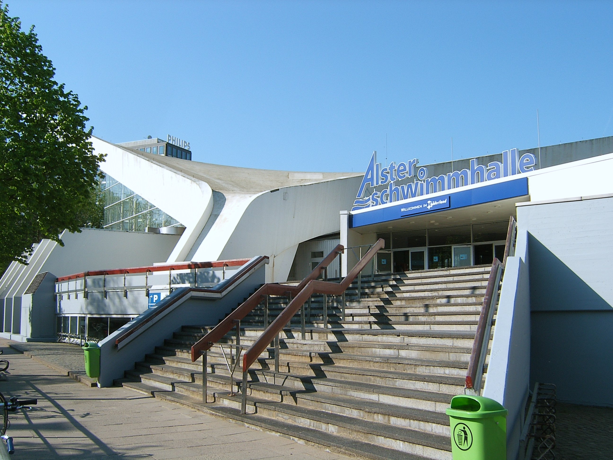 Bildbeschreibung: Hamburg, Hohenfelde, Alsterschwimmhalle Fotograf: selbst Datum: 10.5.2006